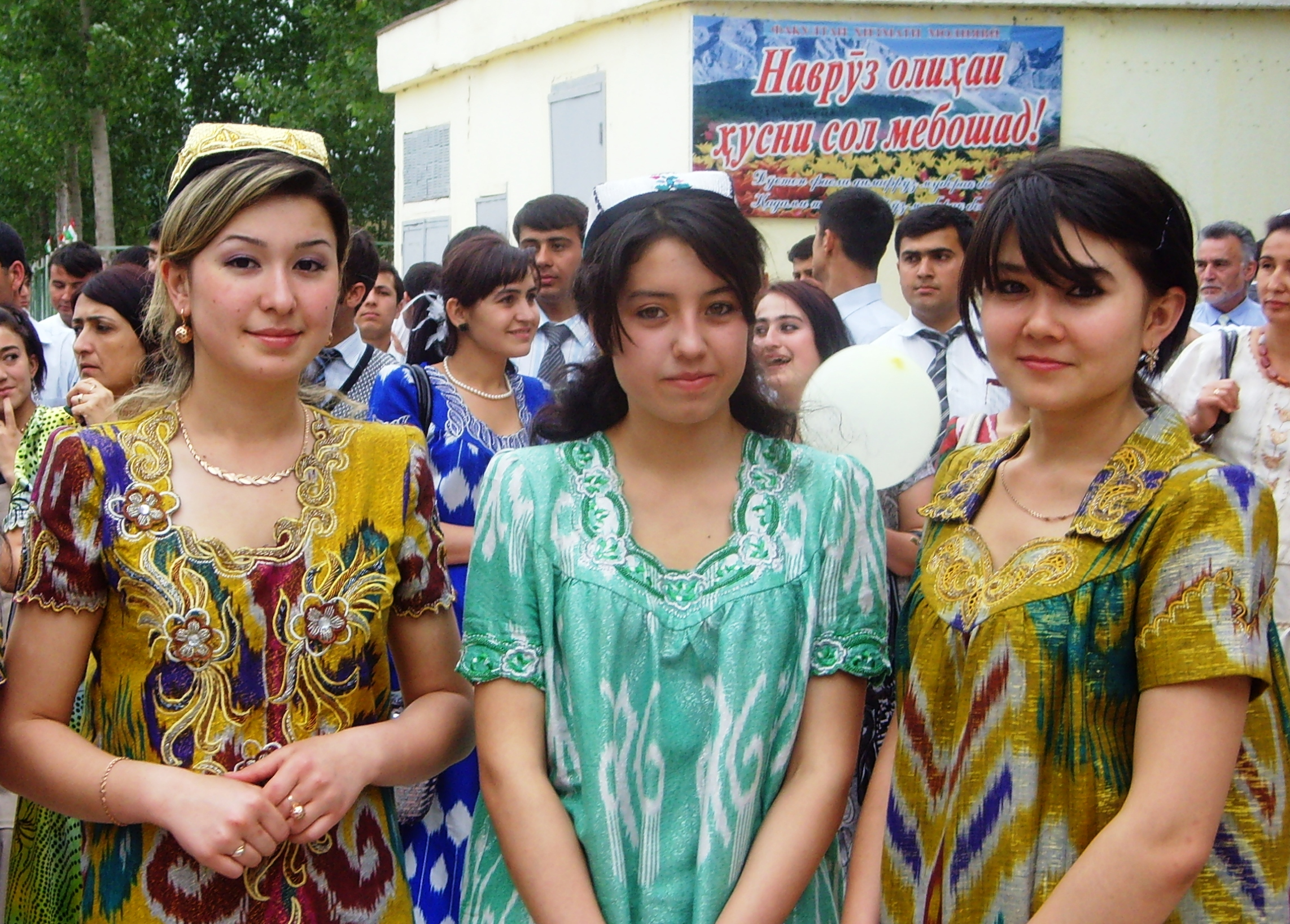 Девушки в современной национальной одежде, лето 2013 года. Таджикистан